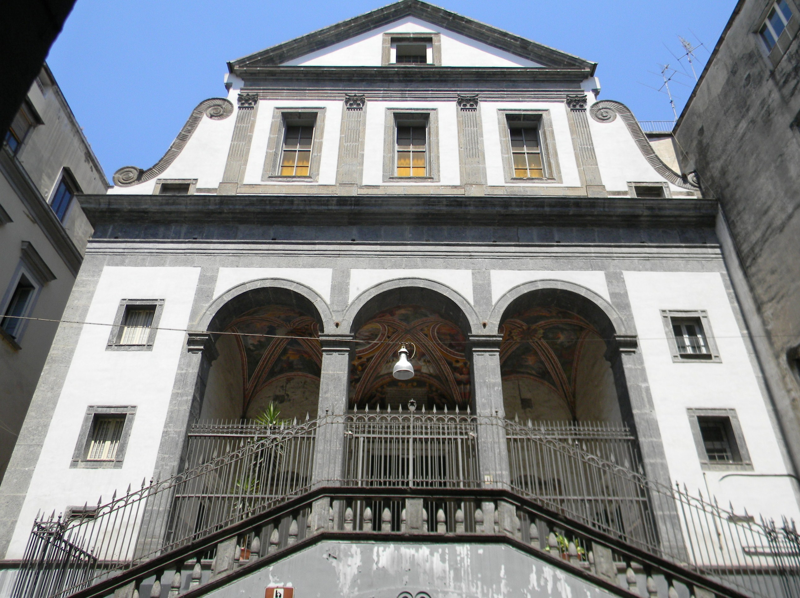 Facciata esterna.